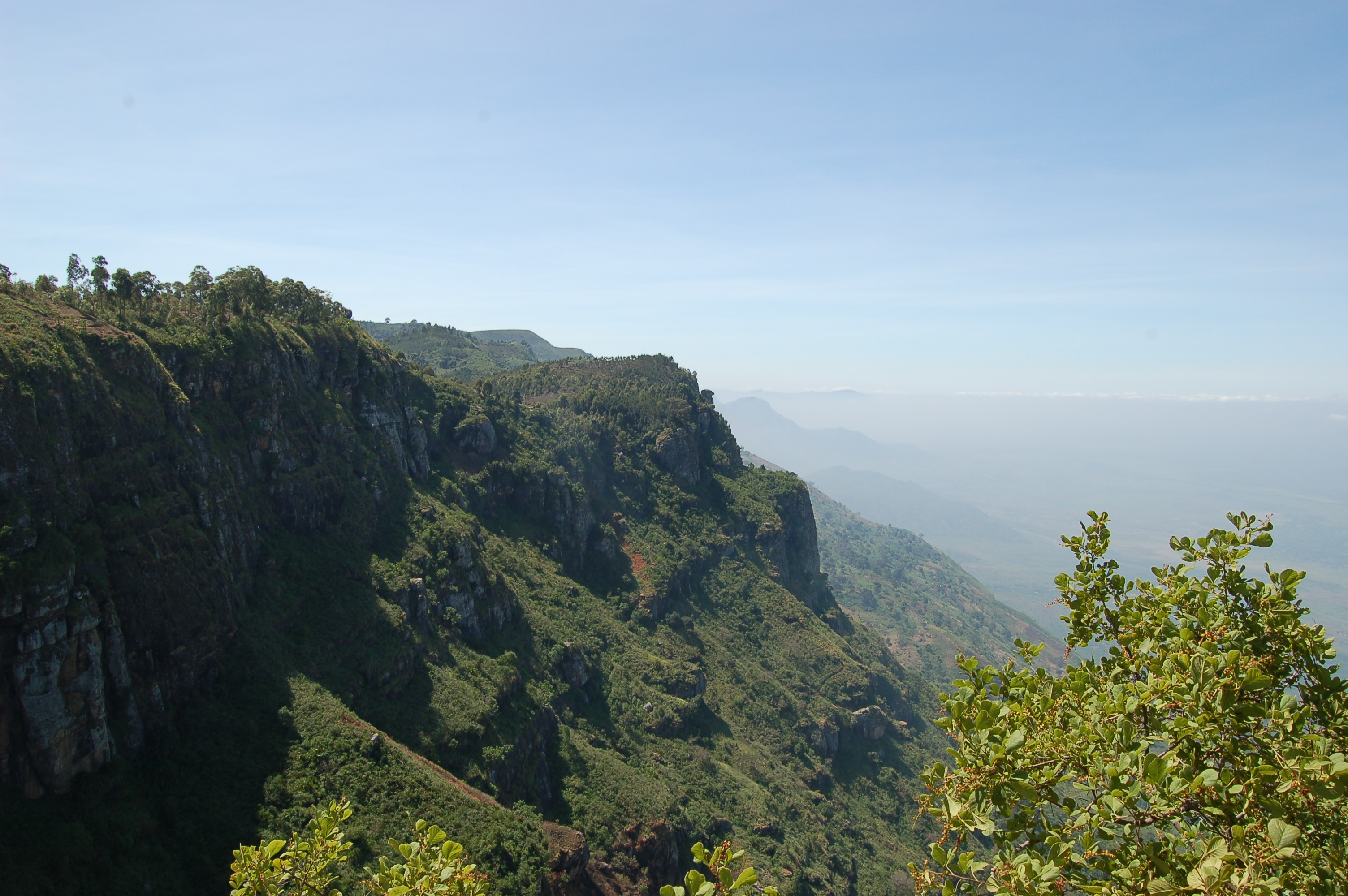 Usambara Mountains, Tanzania